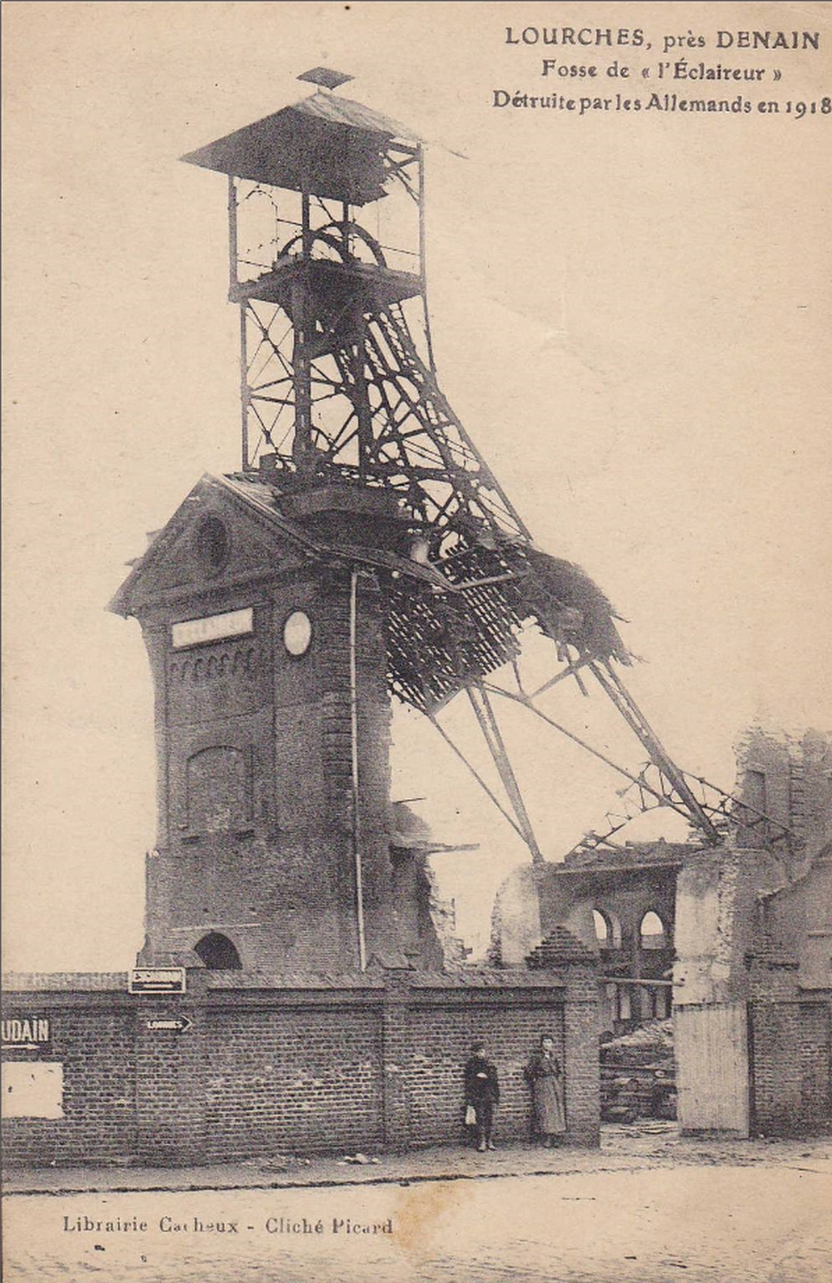 Fosse Éclaireur de la Compagnie des mines de Douchy, Rœulx, Nord, Nord-Pas-de-Calais, France.